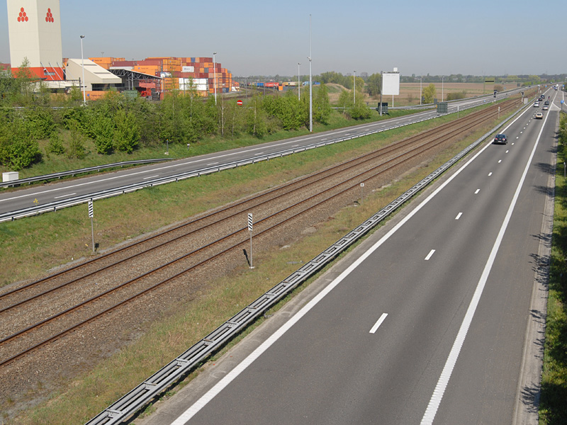 Spoorlijn 11 op de middenberm van de A12 van Antwerpen (B) naar Bergen-op-Zoom (NL), gefotografeerd ter hoogte van de afrit van Stabroek aan het Laageind.